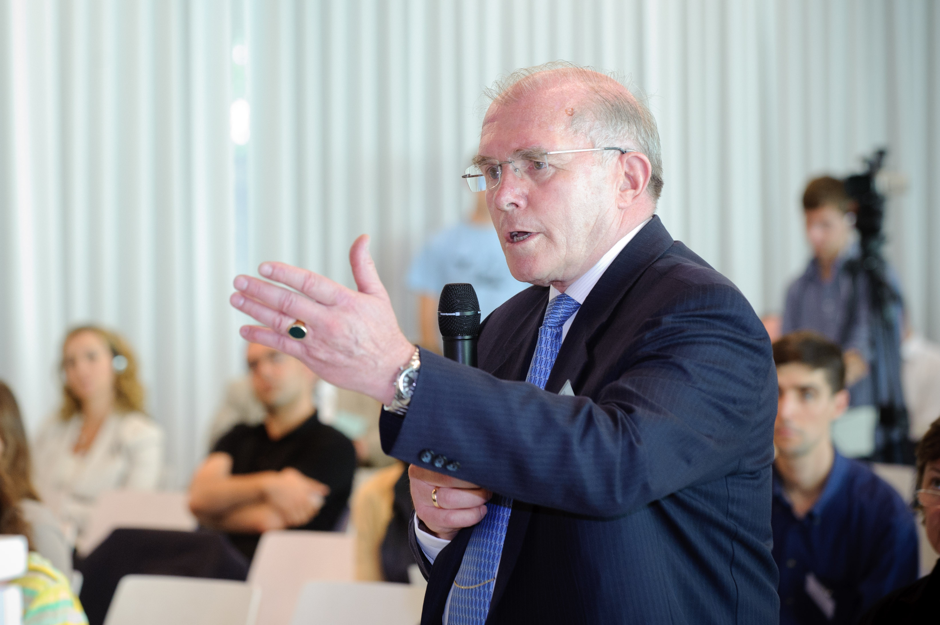 Klaus Naumann (ehem. Generalinspekteur der Bundeswehr)